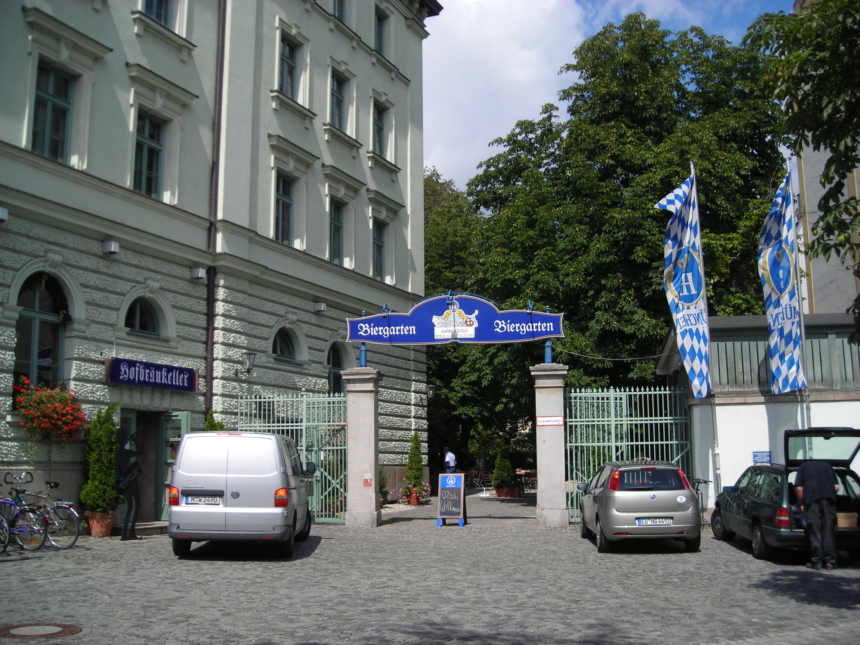 Eingang zum Biergarten des Hofbräukellers (im Bild mittig) sowie zum regulären überdachten Hofbräukeller (im Bild links)